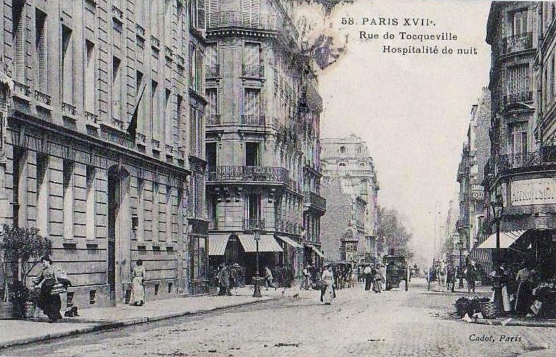 Carte postale - 58, Paris XVIIe, Rue de Tocqueville, Hospitalité de nuit